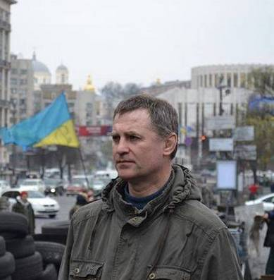 Дмитрий Павличенко